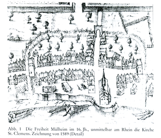 Sankt Clemens Mülheim am Rhein im 16. Jahrhundert